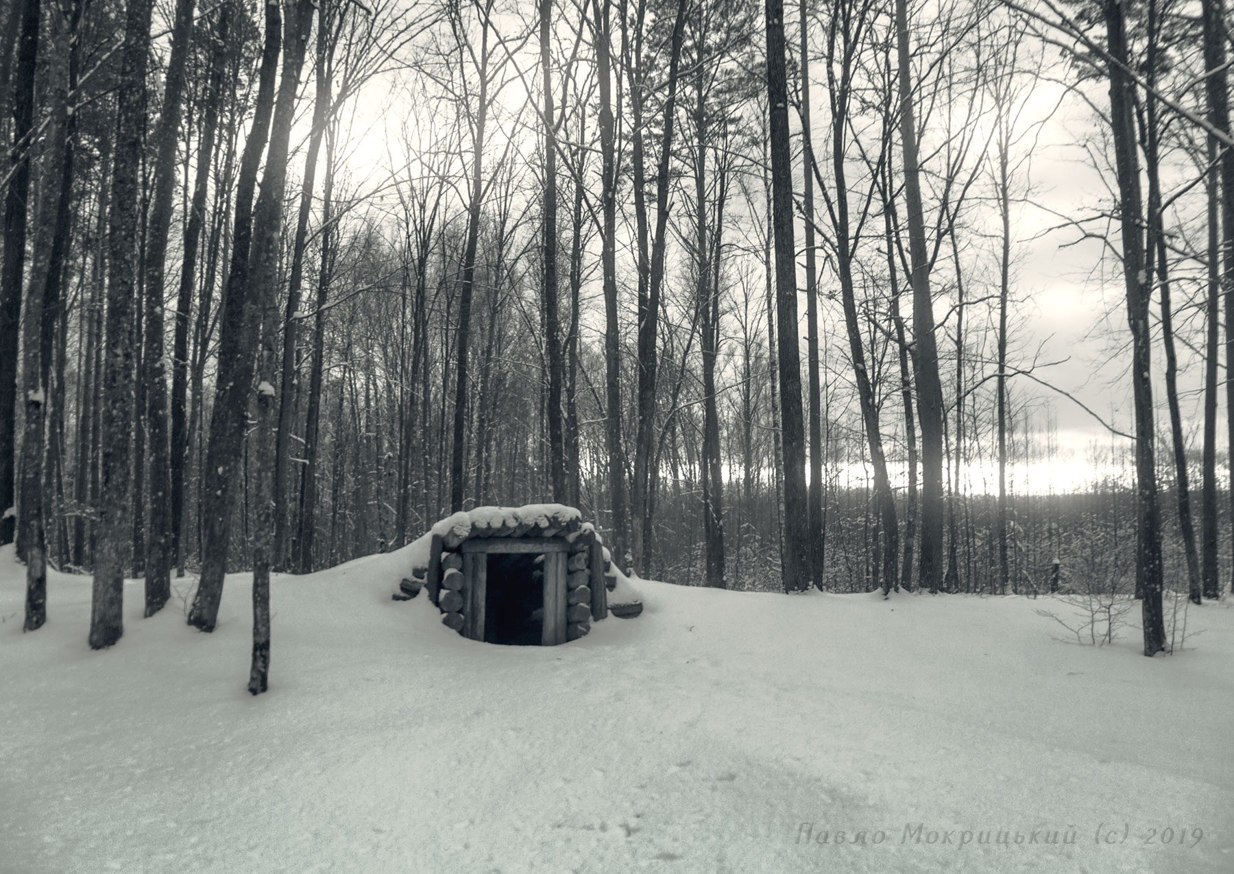 Партизанська землянка (відтворена) на території меморіалу